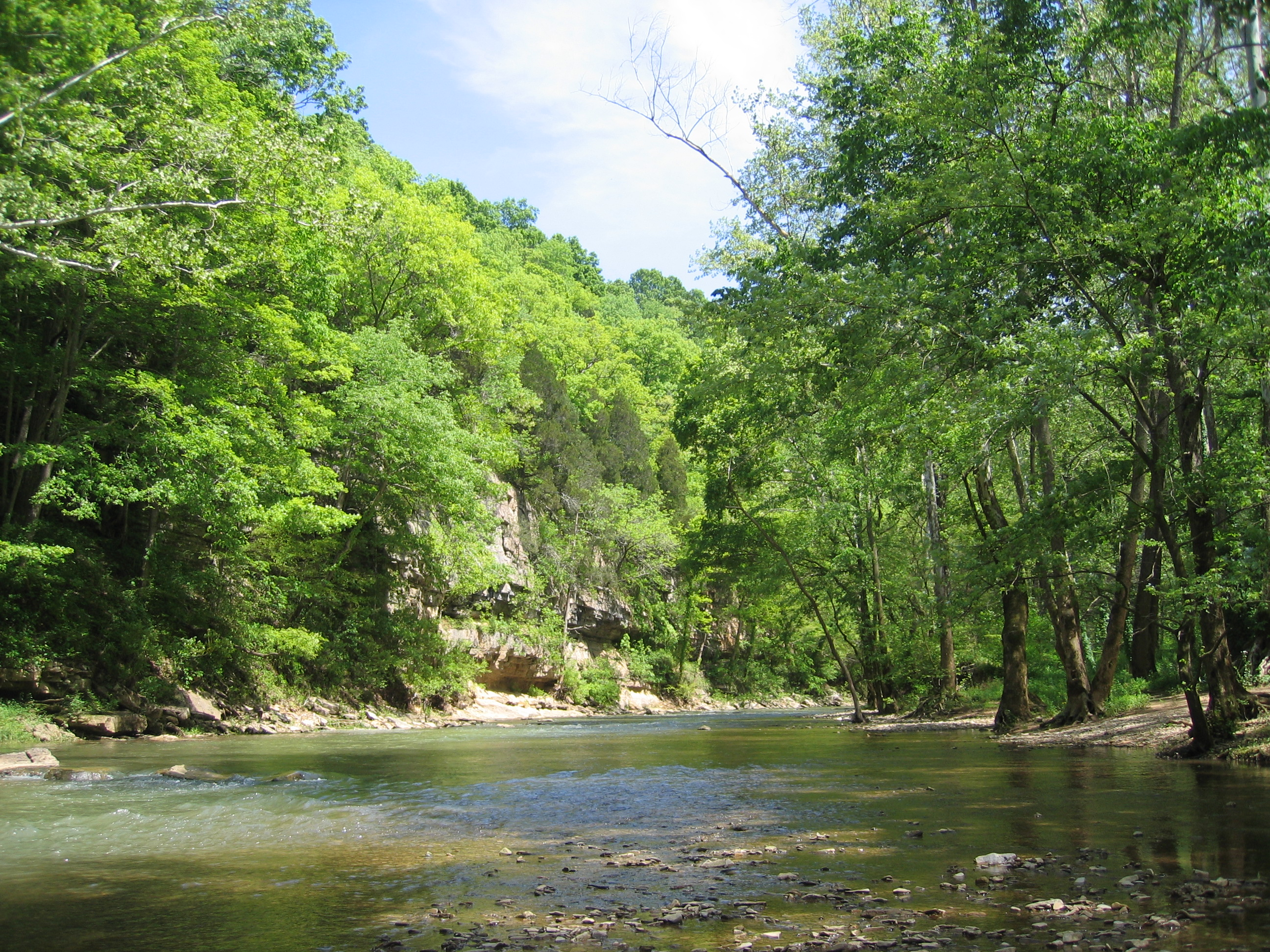 Der Otter Creek, ein kleiner Fluss und ein Schutzgebiet (Otter Creek Park/Otter Creek Outdoor Recreation Area) in der Nähe von Fort Knox, Meade County, Kentucky, USA